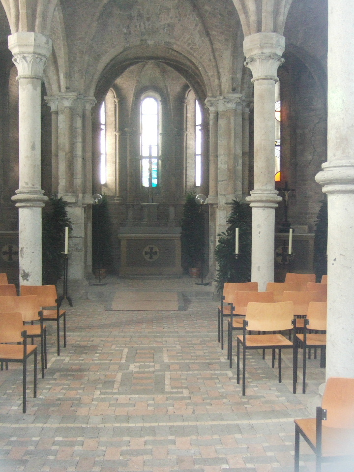 Georgskapelle auf dem Alten Friedhof in Bonn: Innenraum